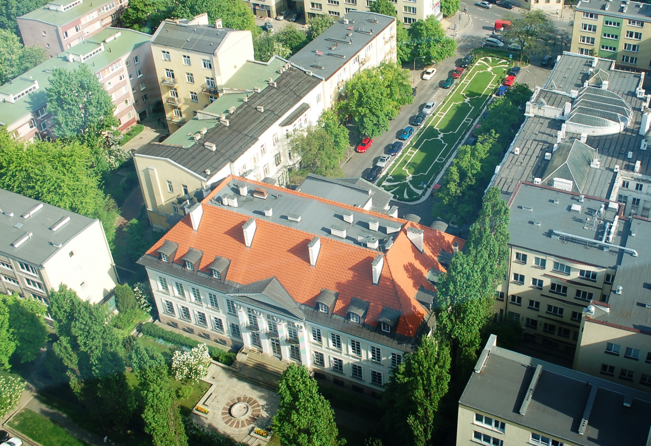 Warschau, belgische Botschaft